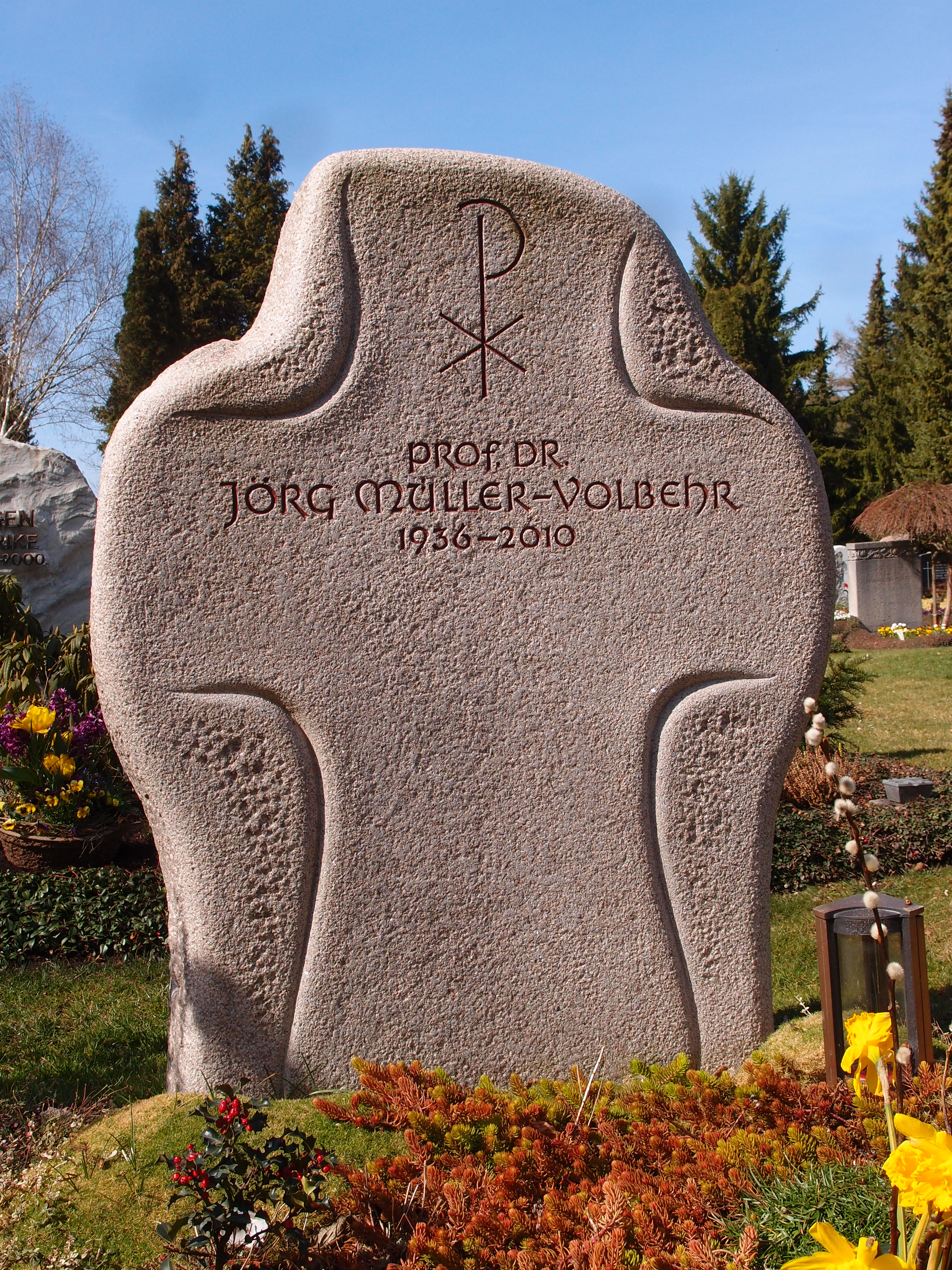 Jörg Müller-Volbehr, 1936-2010, Kirchenrechtler, Grab in Gröbenzell, Bayern